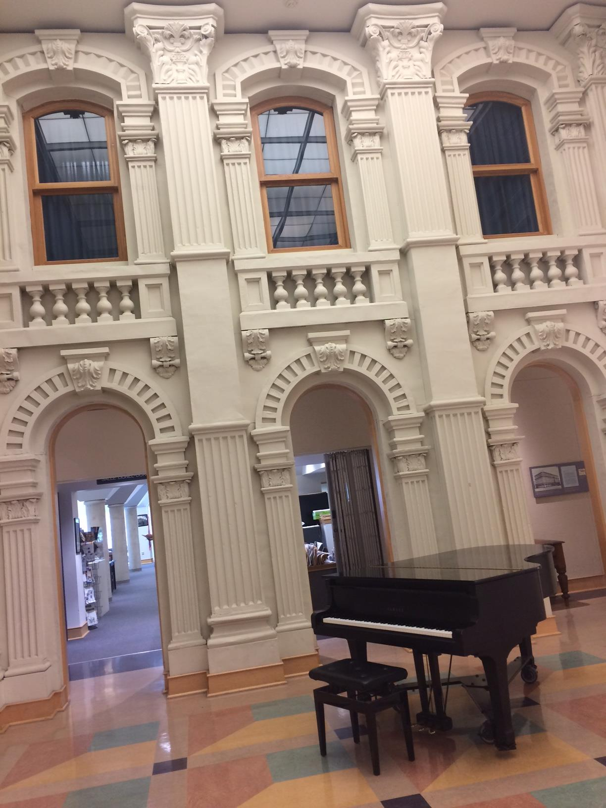 Le Bloc Cauchon, qui abritait Hôtel Empire, a été démoli en 1982. On a pu conserver la façade, dont certains éléments ont été restaurés et incorporés au mur du Salon Empire du Centre du patrimoine.